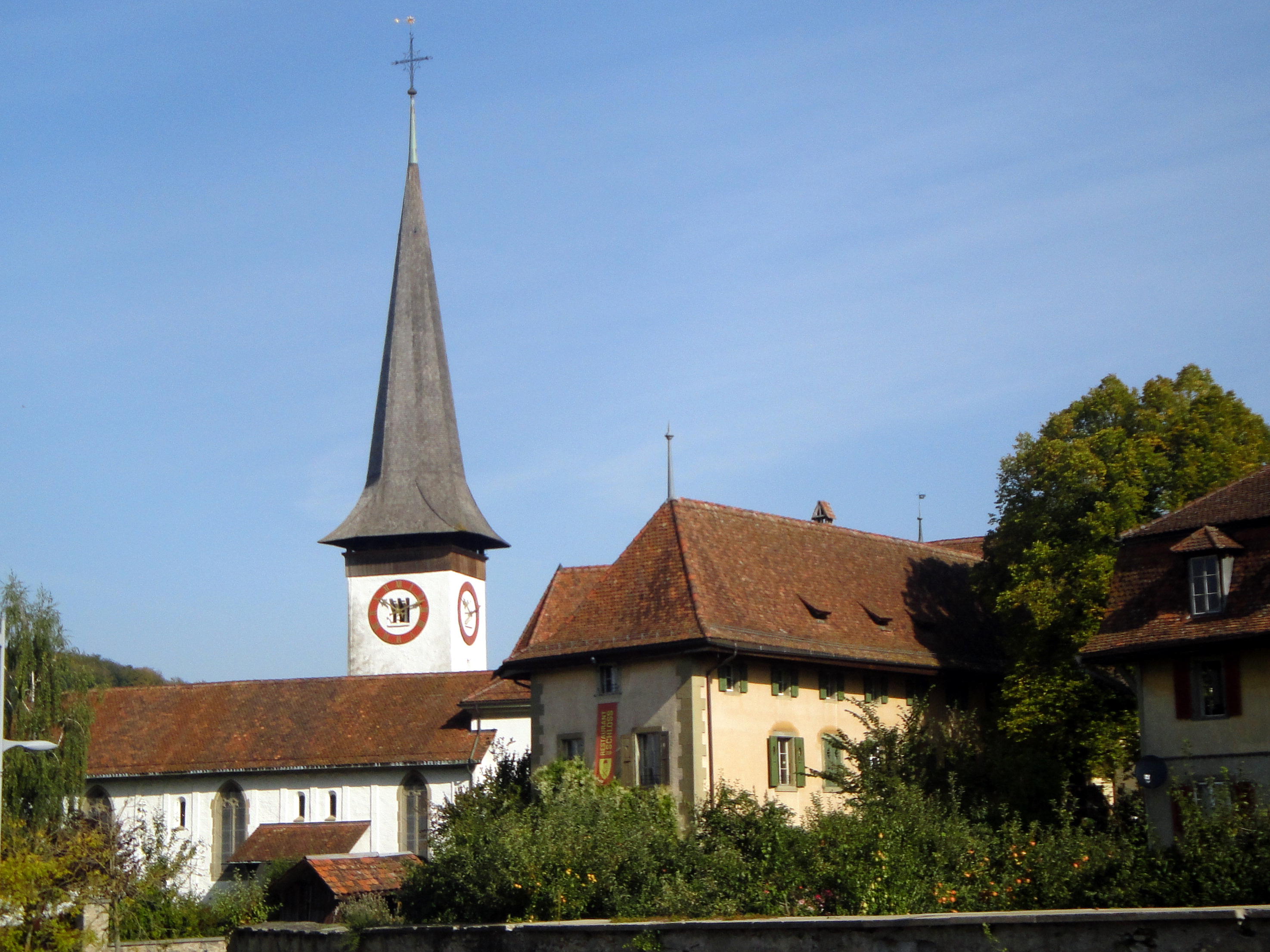 Köniz, Kirche der ehemaligen Komturei